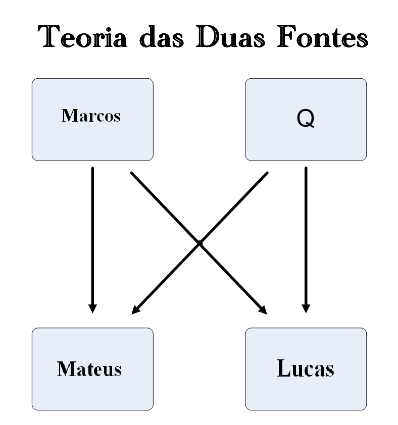 A hipostese das duas fontes para resolução do problema sinótico.